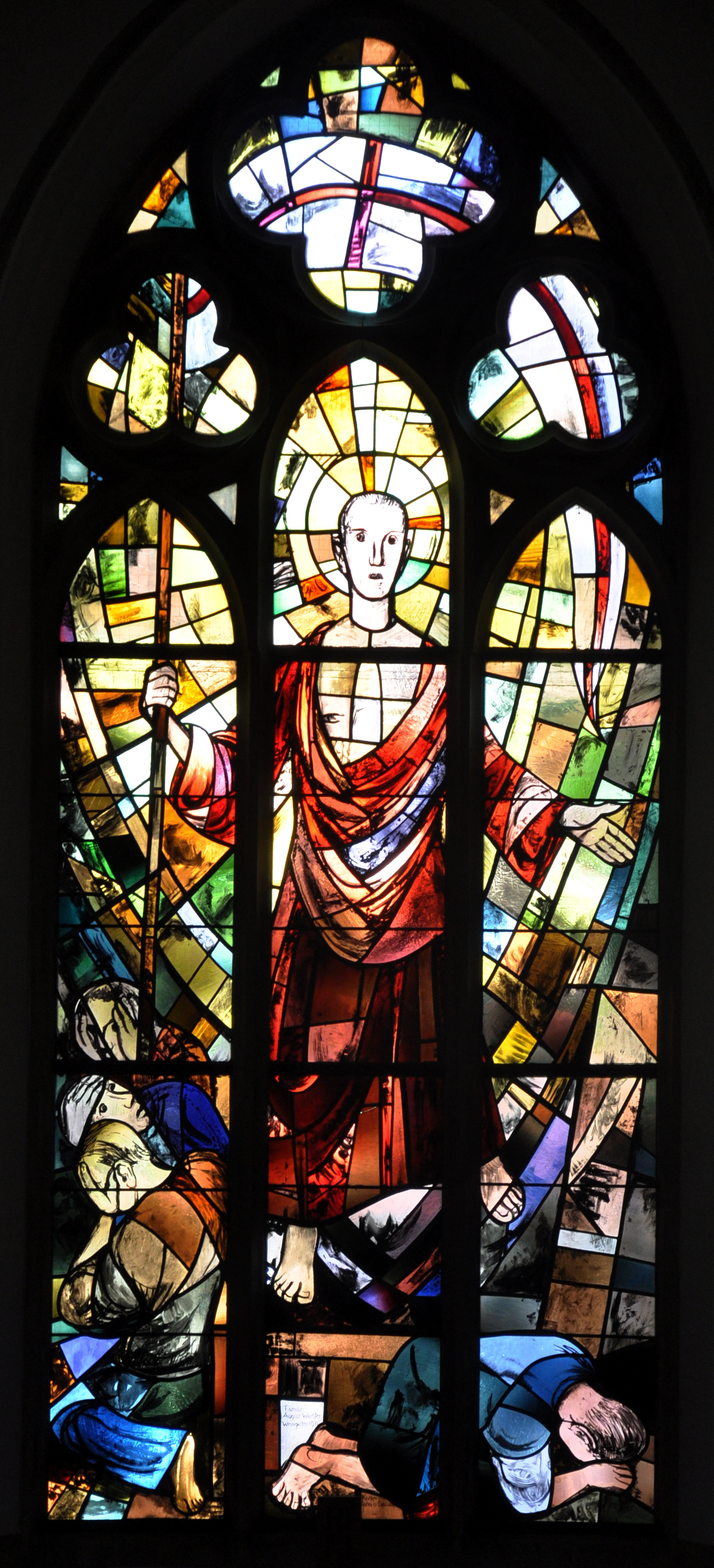 Weingarten (Württemberg), Evangelische Stadtkirche, Chorfenster "Der Auferstandene", 1931 gefertigt von Glasmaler Gaiser nach Entwurf von Walter Kohler (Stuttgart)